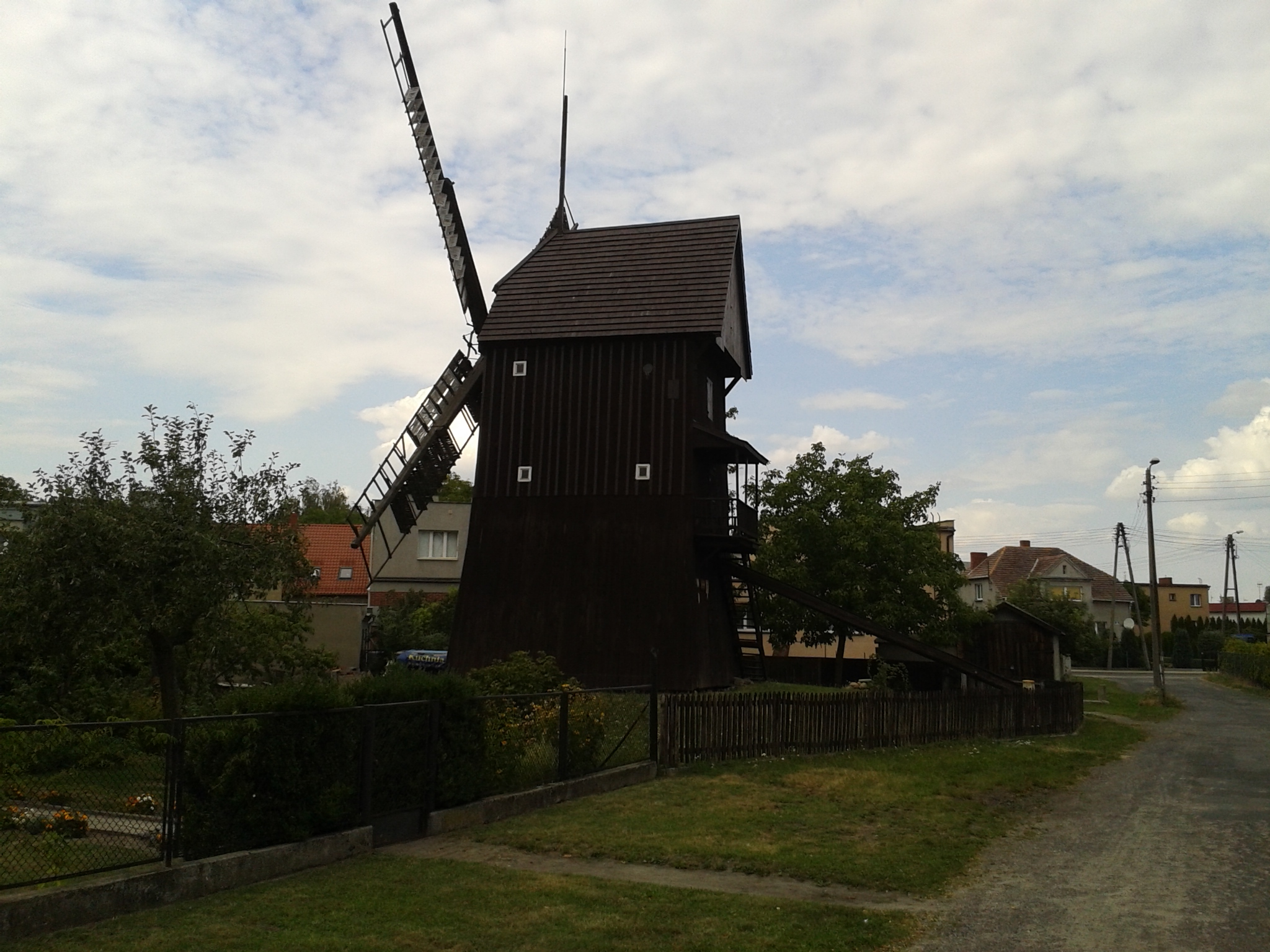 Wiatrak "Antoni" Leszno ul. Strumykowa